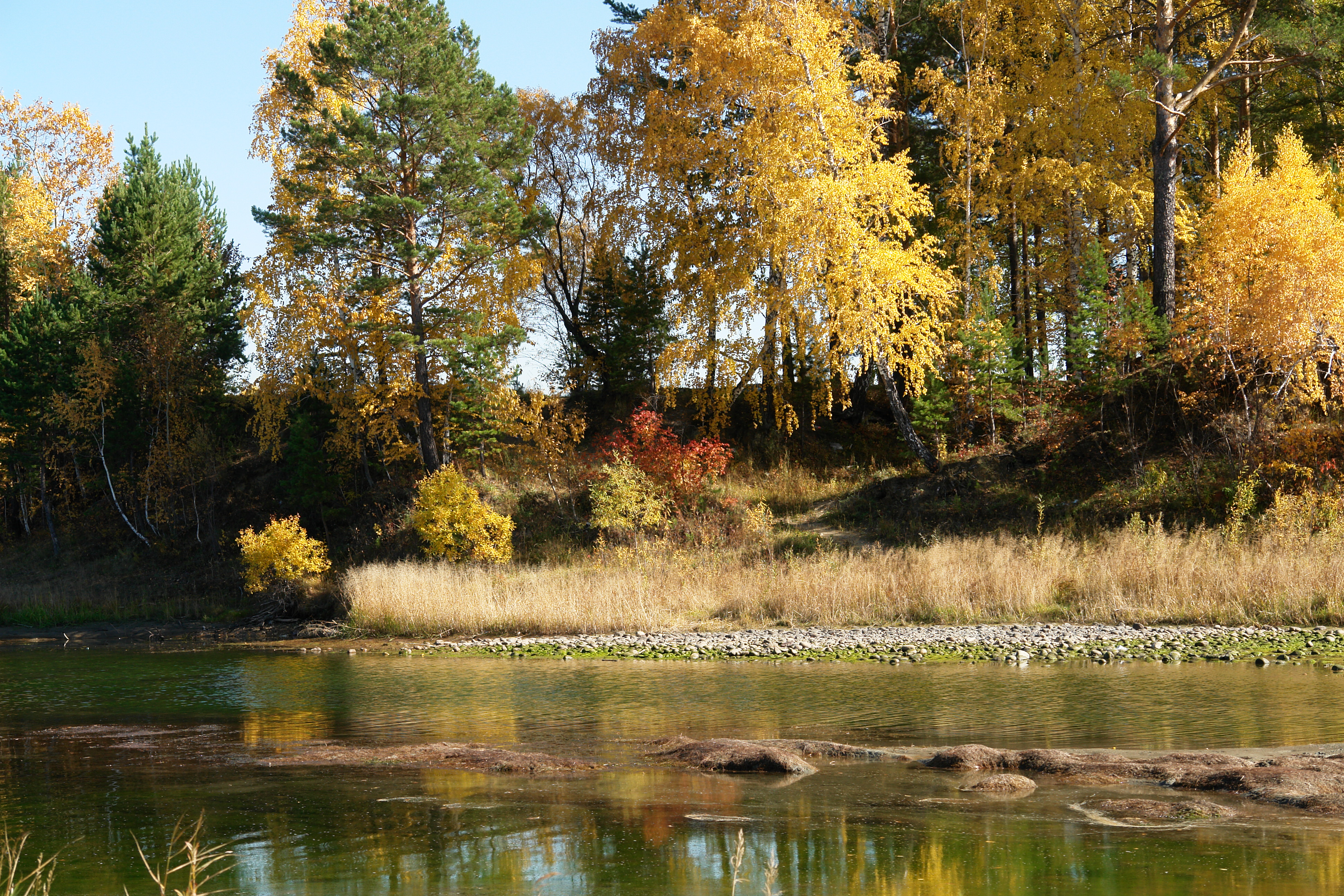 Осенний цвет Китоя!